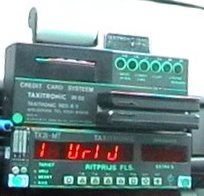 Het beeldmateriaal `Taxameter_common.jpg´ is ter beschikking gesteld door City Tax Kerkrade B.V. en door dit bedrijf (gevestigd op de Blijerheiderstraat 12 & 133 te Kerkrade) zelve c.q. in haar opdracht vervaardigd. City Tax beschikt dus tevens over de orginelen van de afbeelding. Voor alle gebruikte afbeeldingen op de City Tax site is gebruik gemaakt van zelf vervaardigd beeldmateriaal, in opdracht van City Tax gemaakt materiaal c.q. is toestemming gegeven door de eigenaar van het materiaal om één en ander te mogen gebruiken. De afbeelding mag getoond worden op de Wikipedia dot org site onder het item `Taxi (vervoer)´ en eenieder is voorts gerechtigd de afbeldingen op de City Tax site vrijelijk te gebruiken zolang dit niet op `aanstootgevende sites´ plaatsvindt c.q. het geheel (direct dan wel indirect) wordt misbruikt om agressie, geweld of bijvoorbeeld sexueel getinte inhoud te duiden. Voor verdere informatie is men welkom contact op te nemen met . Afsluitend is dit bericht bericht (met PGP signature) ter verificatie te lezen op de City Tax server. --CabMasTeR 7 sep 2007 08:22 (CEST) Passage doorgehaald door Ninane, 7 sep 2007 10:17 (CEST), in strijd met de licentie. Wel een vriendelijk verzoek de doorgestreepte wens van de uploader te respecteren.